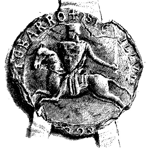 Sceaux de André de Montbard